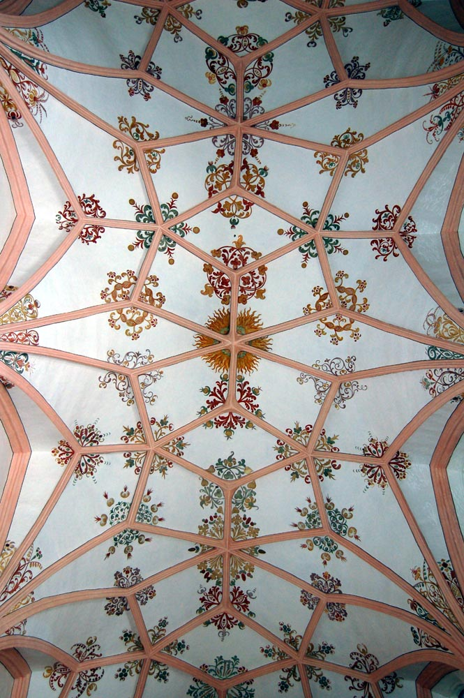 neu renoviertes Kreuzrippengewölbe in der Pfarrkirche in Mondsee, Oberösterreich